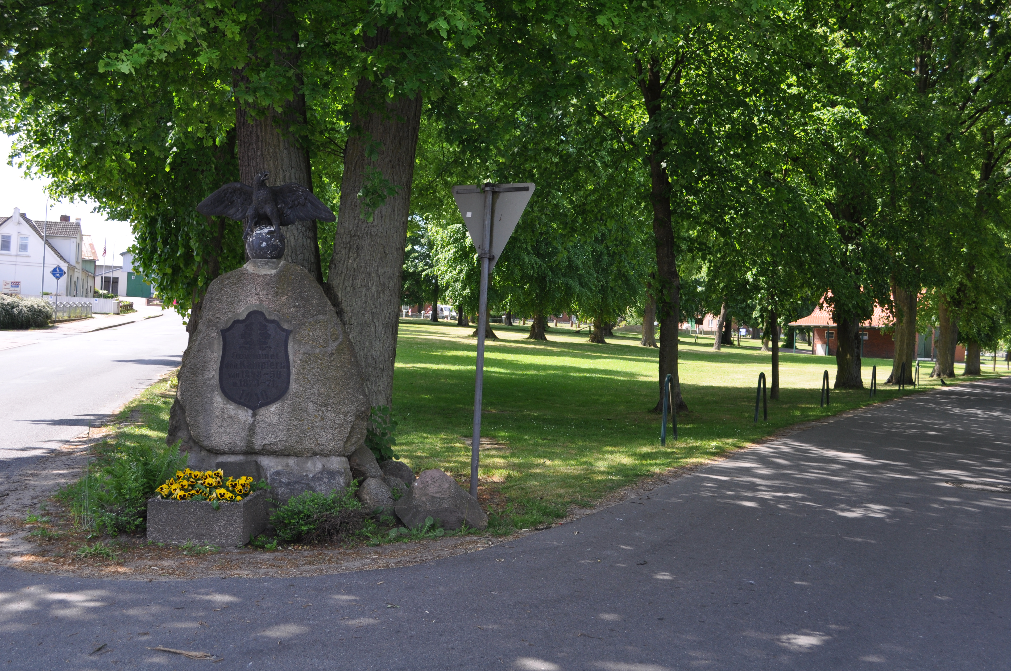 Kriegerdenkmal der Gemeinde Leezen (Holstein).